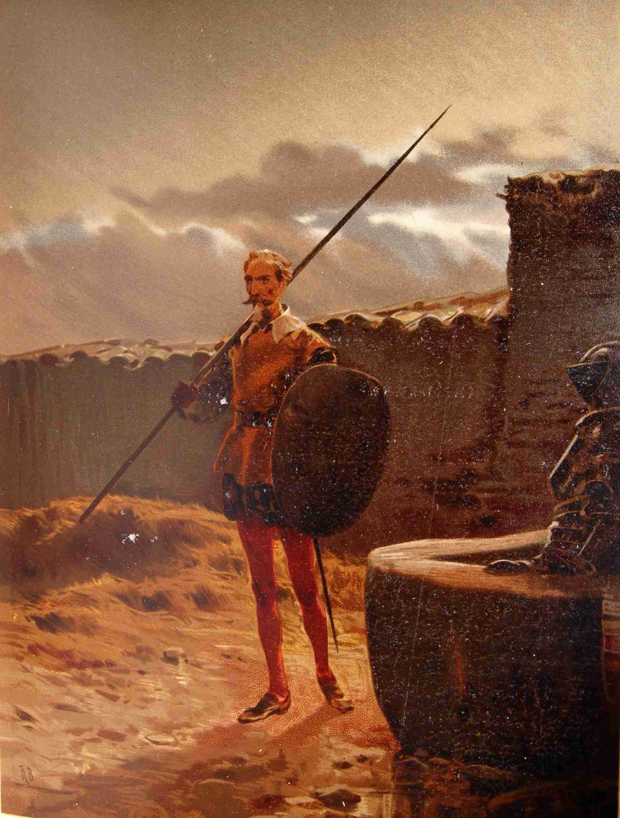 202_011_quijote_cap03